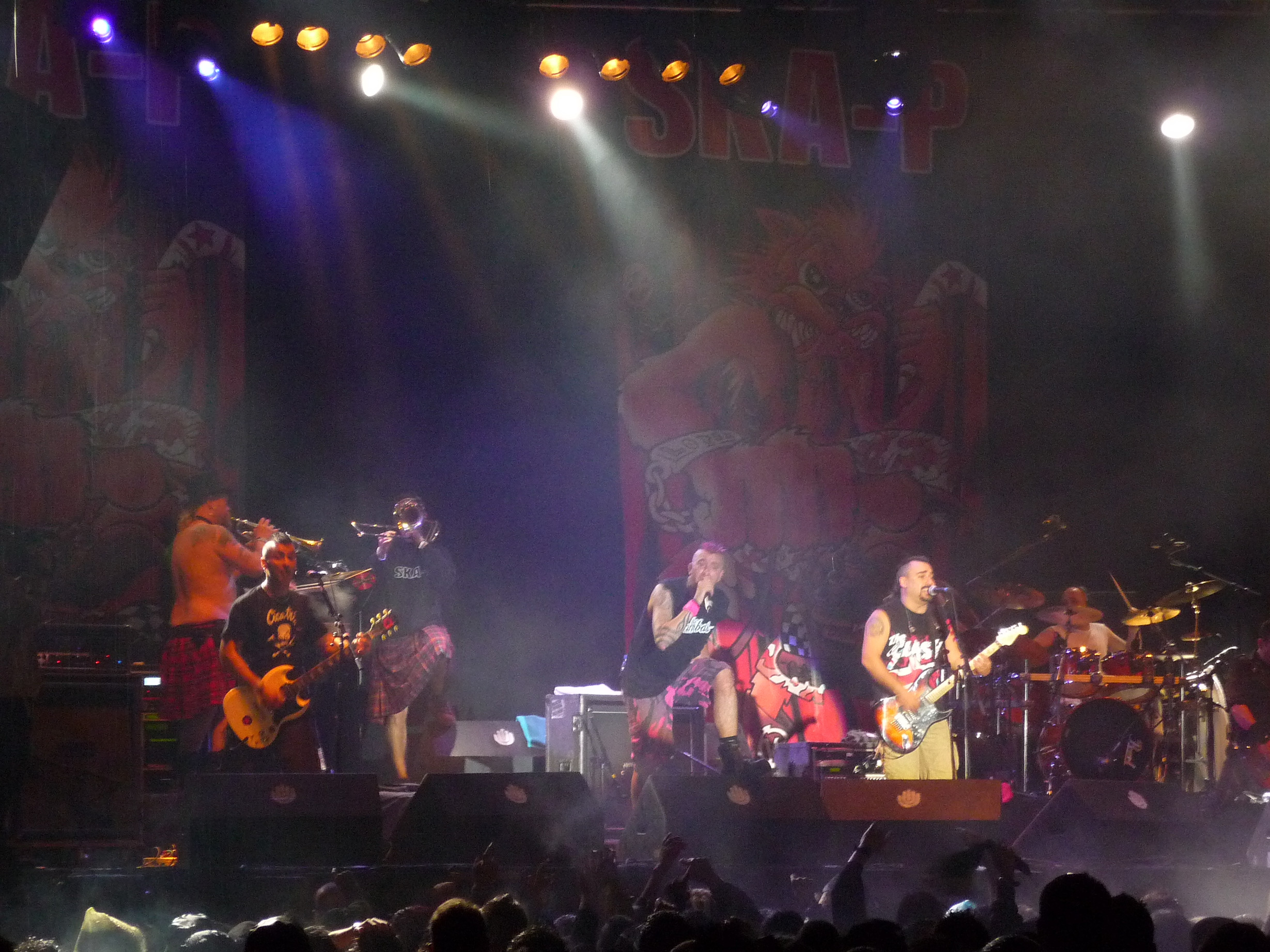 Ska-P en Extremúsika 2009. Mérida. España.